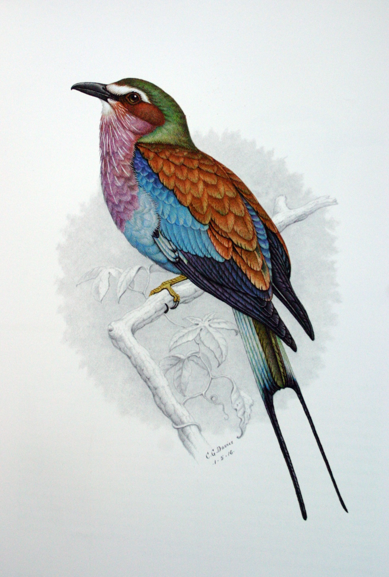 Lilac-breasted Roller Coracias caudata (adult male)